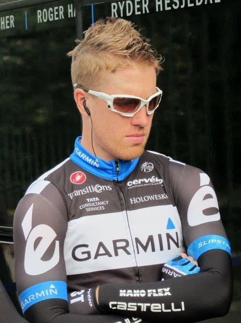 Lors de Gent Welvelgem